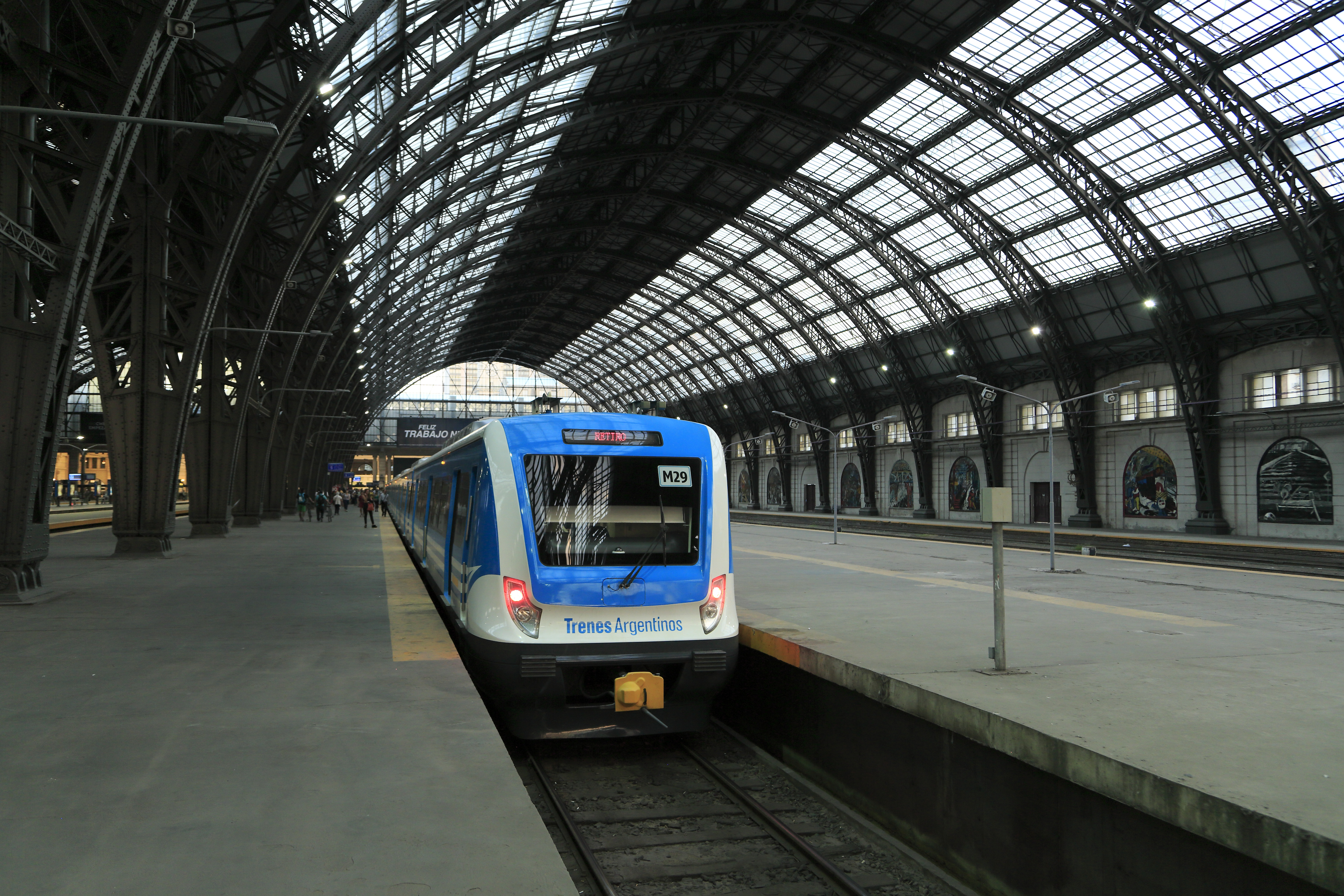 CSR-Triebzug, eingefahren von Bartolomé Mitre; vom Ausgangsbahnsteig 4/5 Richtung Querbahnsteig.